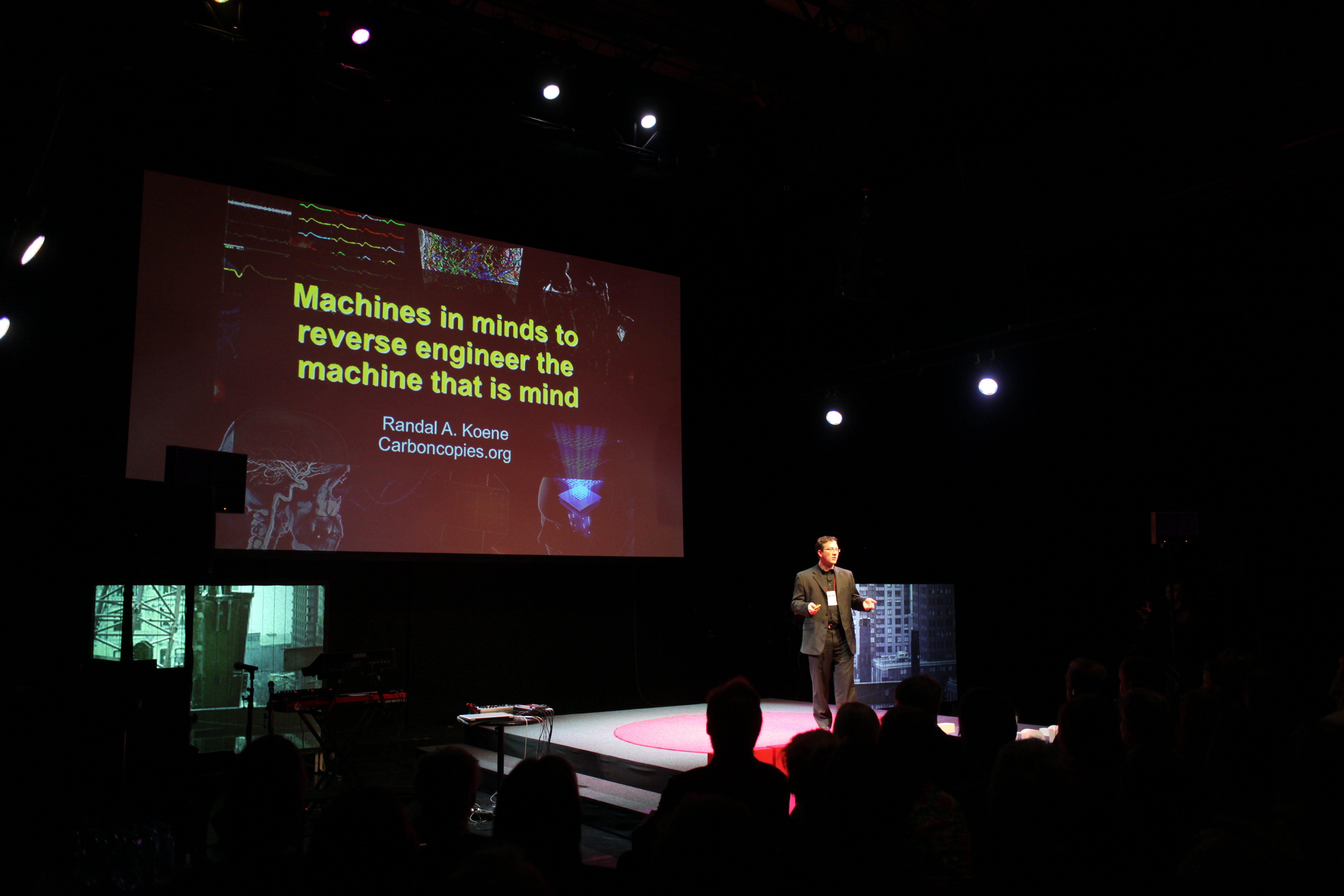 Randal A. Koene esinemas TEDxTallinn konverentsil 2012. aastal.